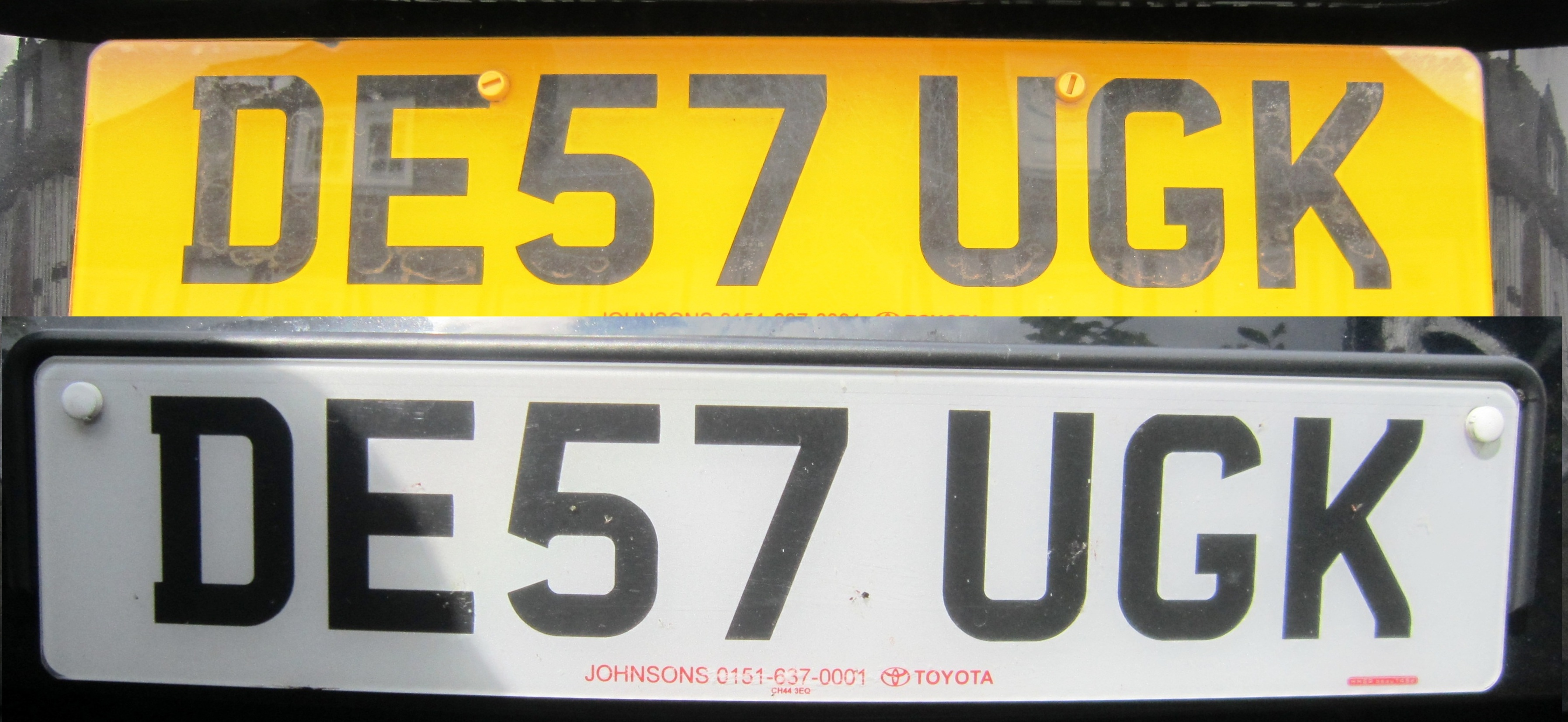 UK kentekenplaat voor en achter